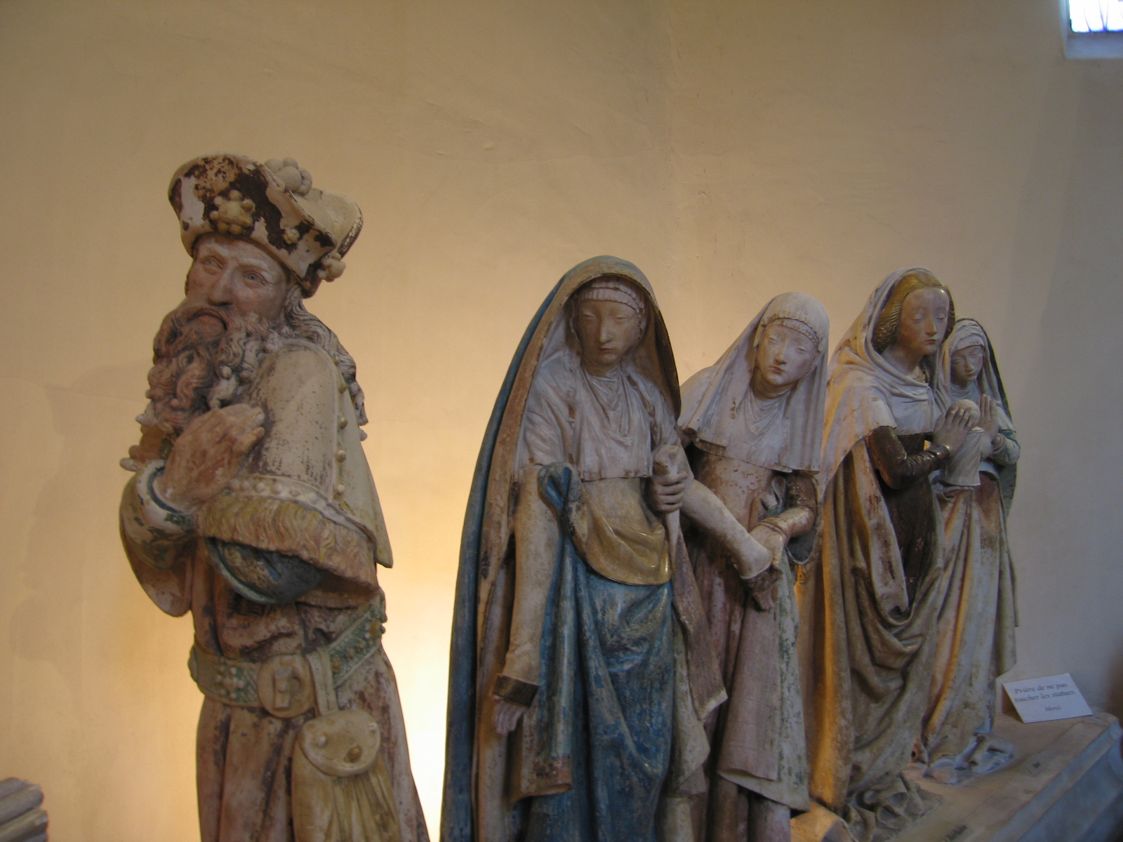 Mise au Tombeau de Combefa, groupe de personnage de droite